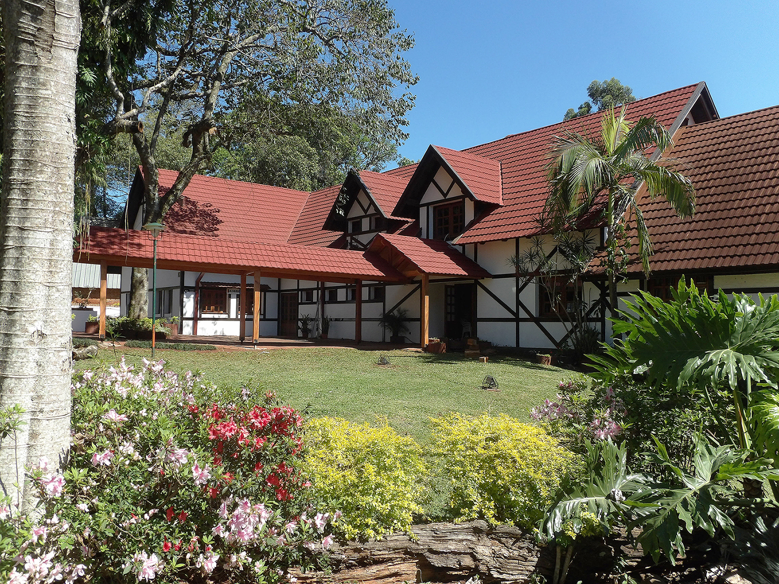 casa típica de la Colectividad Alemana de Misiones ubicada en Oberá, Misiones, Argentina.